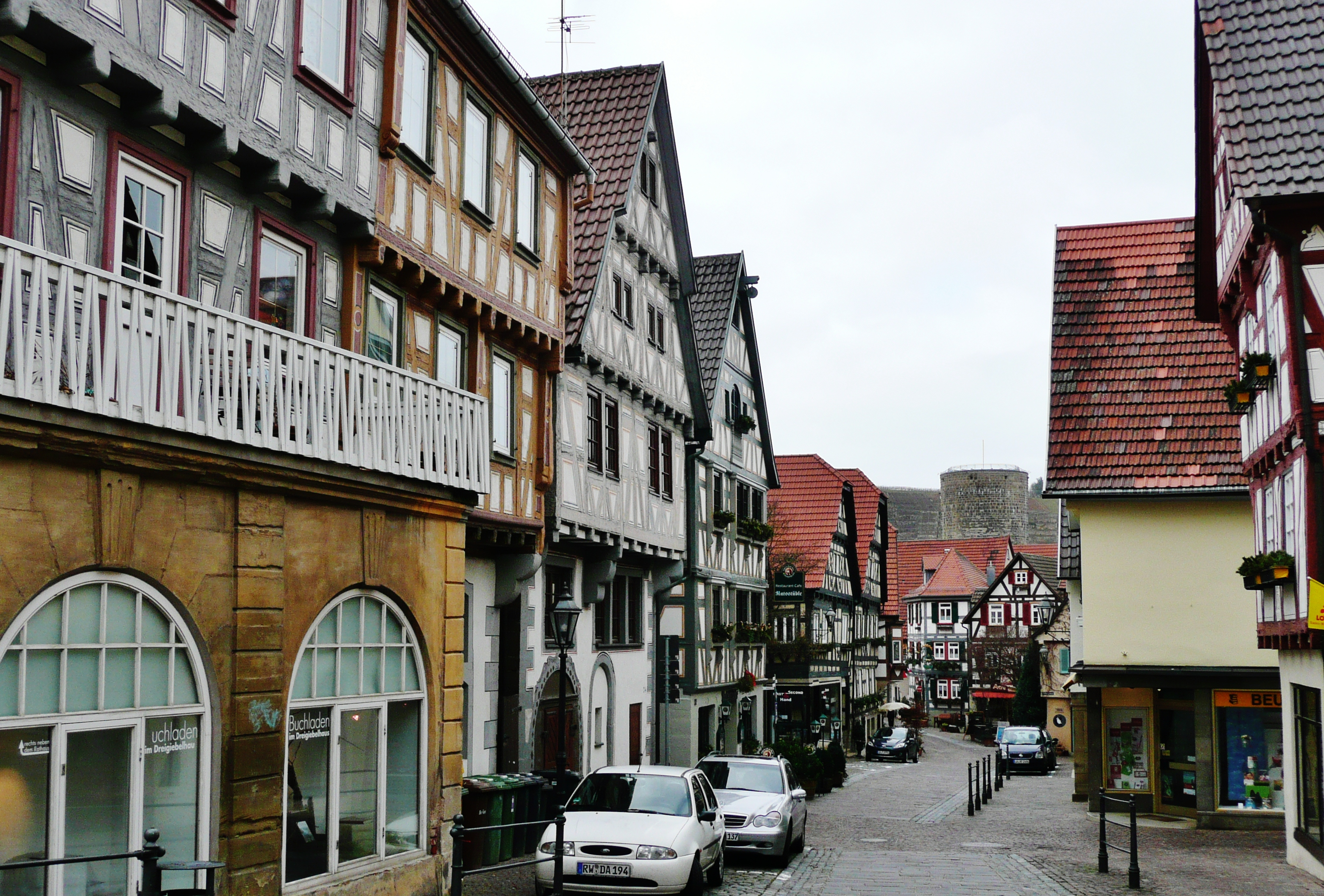 Kirchstraße, Besigheim